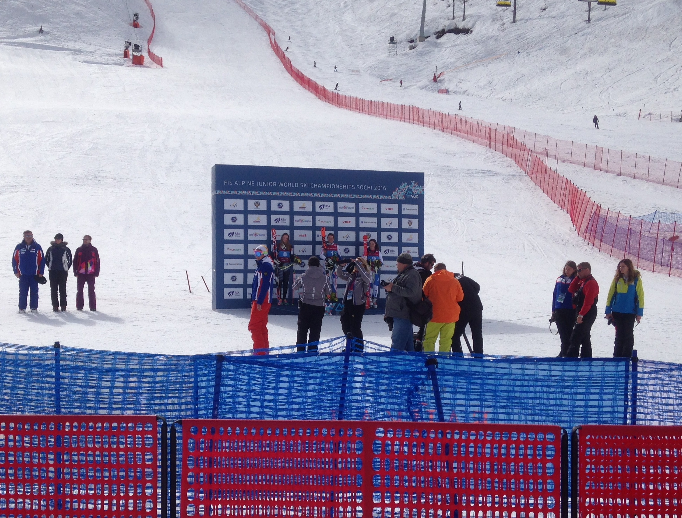 Цветочная церемония награждения призёров Чемпионата мира по горнолыжному спорту среди юниоров (женщины) 2016 в гигантском слаломе на горнолыжном курорте Роза Хутор.